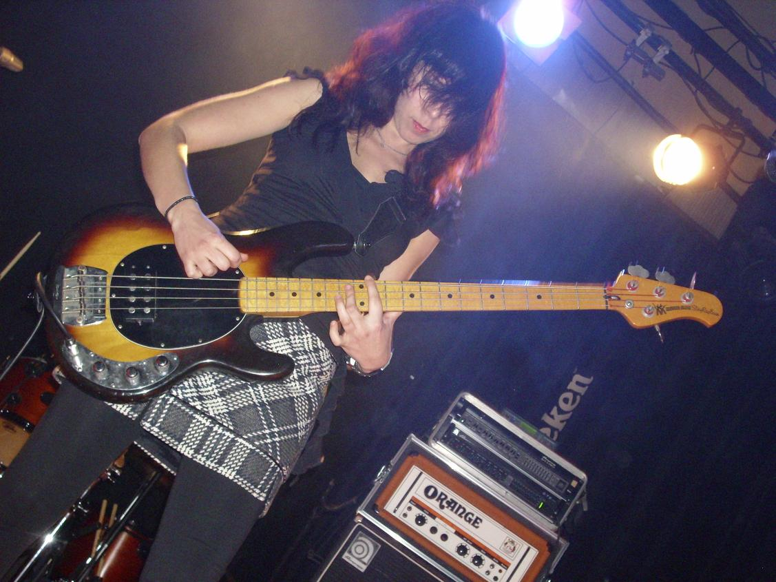 Marjolein Kooijman Sala Heineken Madrid , 7 Febrero 2010